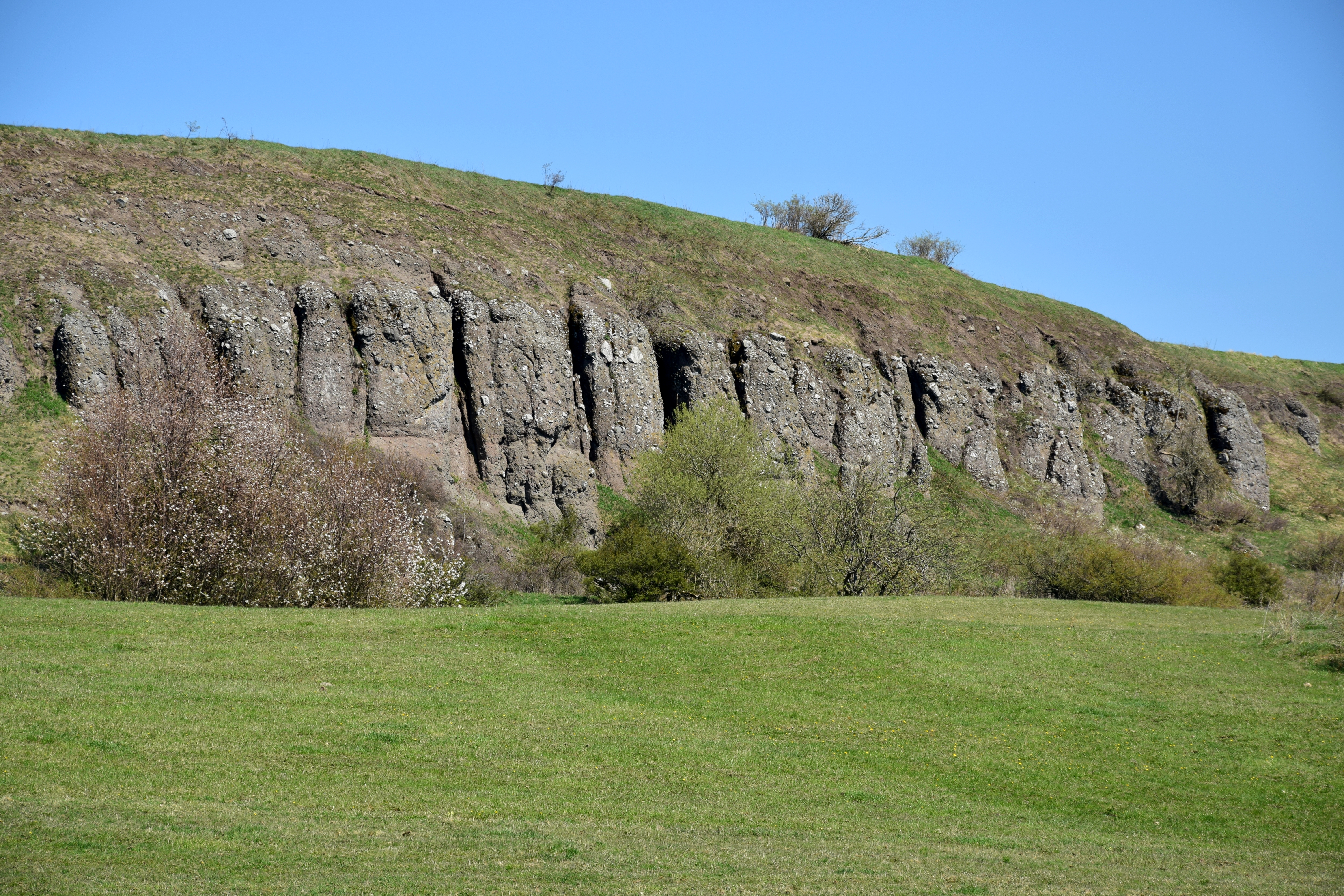 Vojenský újezd Hradiště – profil laharovými aglomeráty u Javorné s archeologickými stopami hradiště